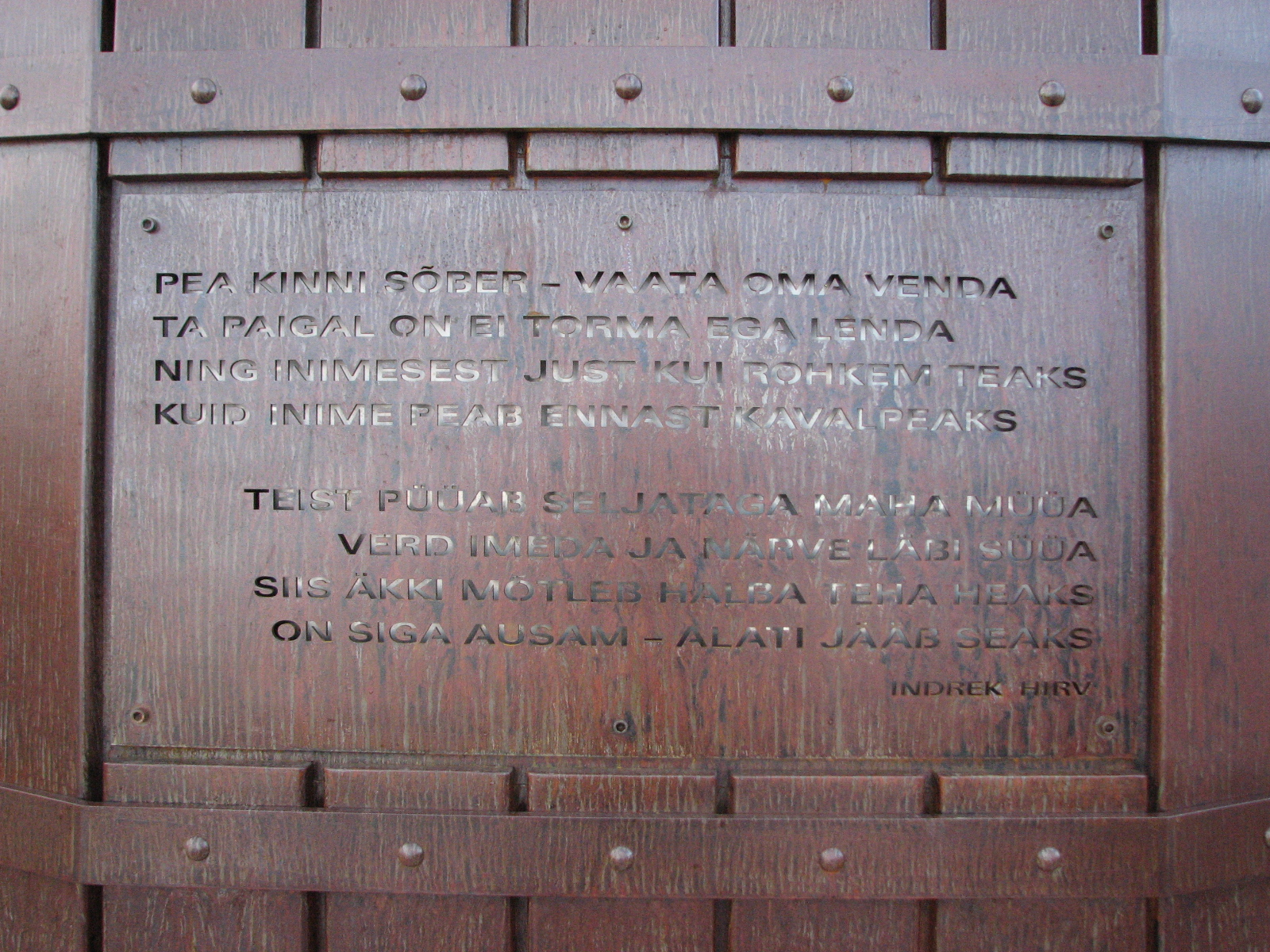 Bronze pig statue in Tartu, Estonia.